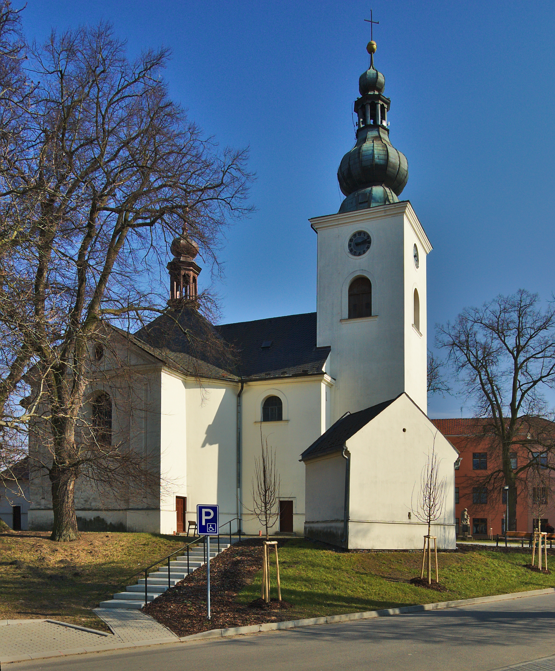 Kostel svatého Jana Křtitele, Olšany, okres Prostějov